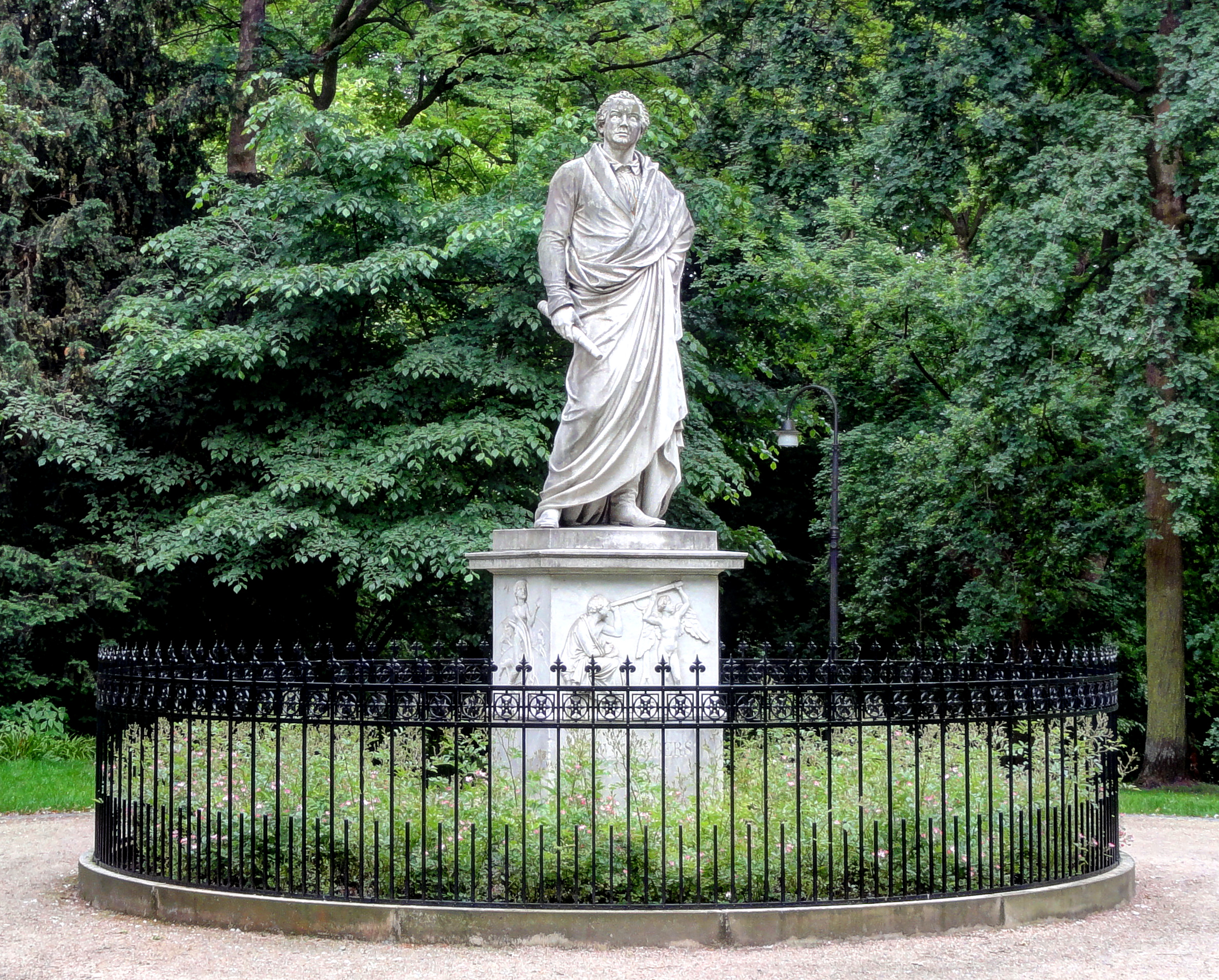 Olbers-Denkmal in Bremen, WallanlagenDas abgebildete Objekt ist ein geschütztes Kulturdenkmal in der Freien Hansestadt Bremen, mit der Nr. 1193,T002 beim Landesamt für Denkmalpflege registriert.